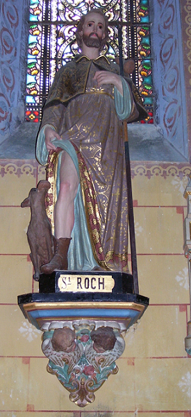 Skulptur des Heiligen St Roch in der Kirche Ste Marie-Madeleine in Rennes-le-Chateau